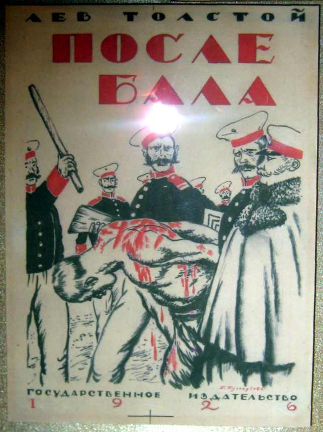 Обложка "После бала", Лев Толстой, 1926. Б.Кустодиев